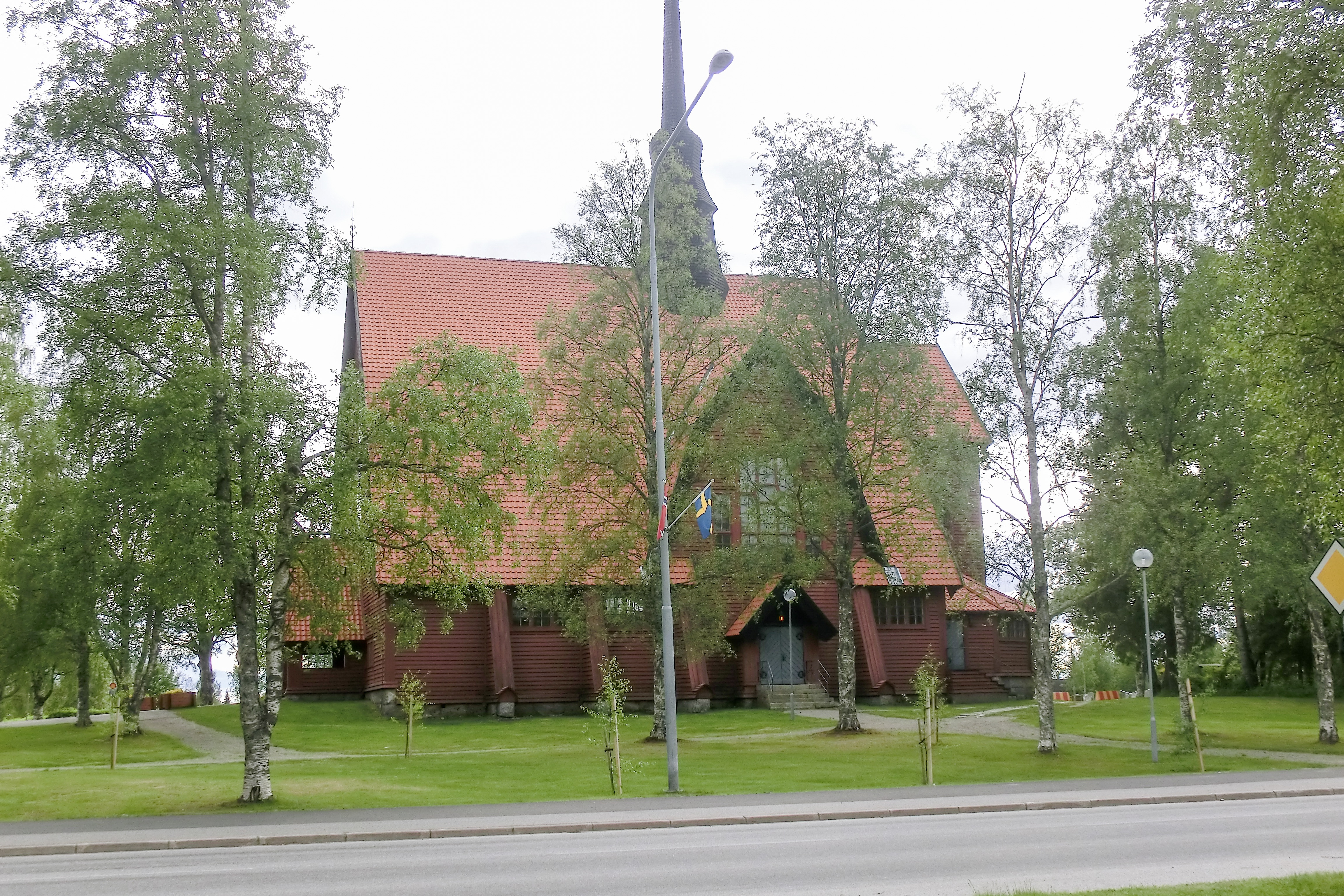 Norsjö kyrka